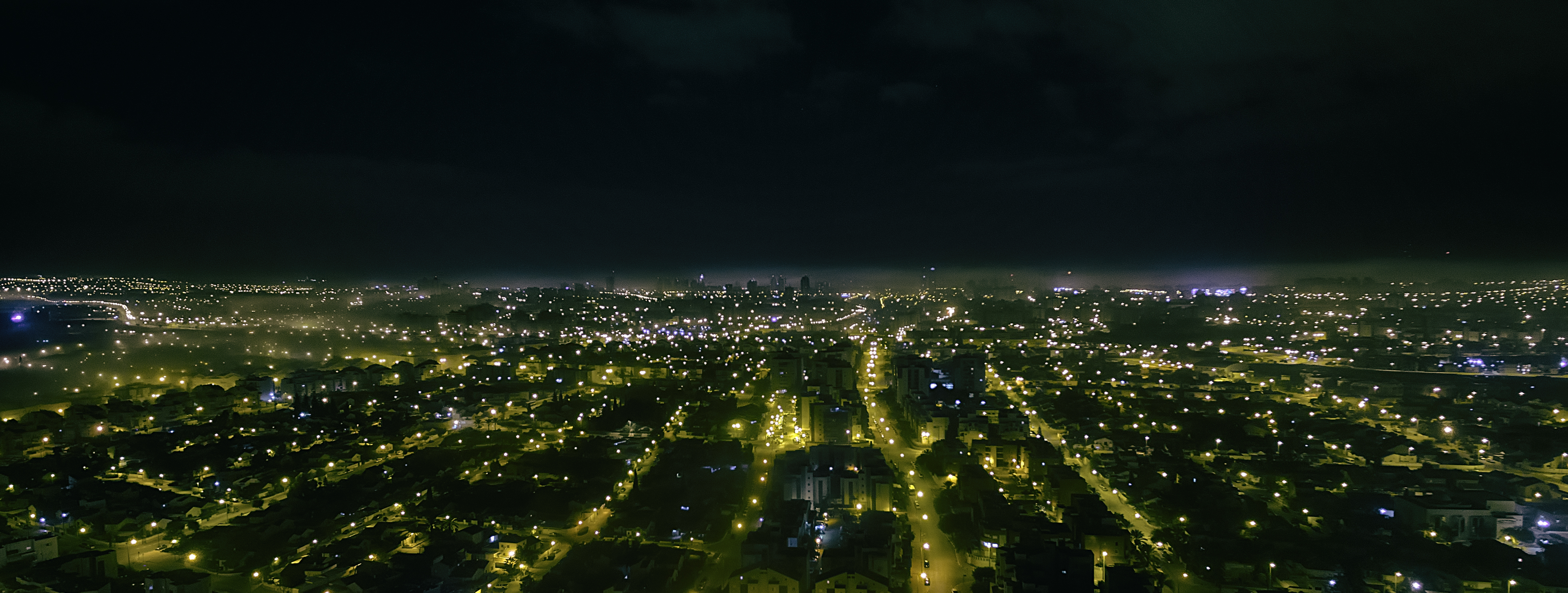 Беэр - Шэва с птичьего полета